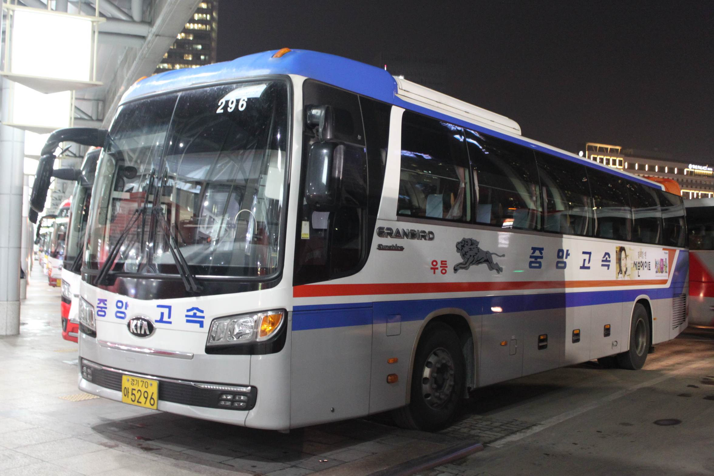 기아 이노베이션 그랜버드 유로6 선샤인 정측면